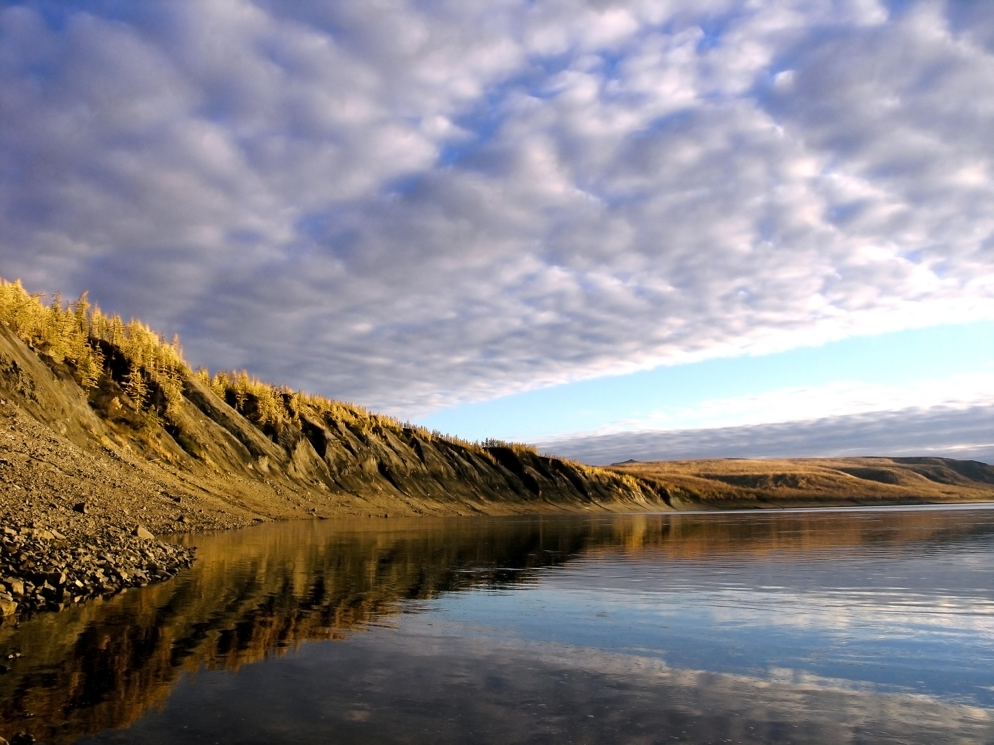 Река Котуй. Фото сделано в районе поселка Каяк в сентябре 2004 года.